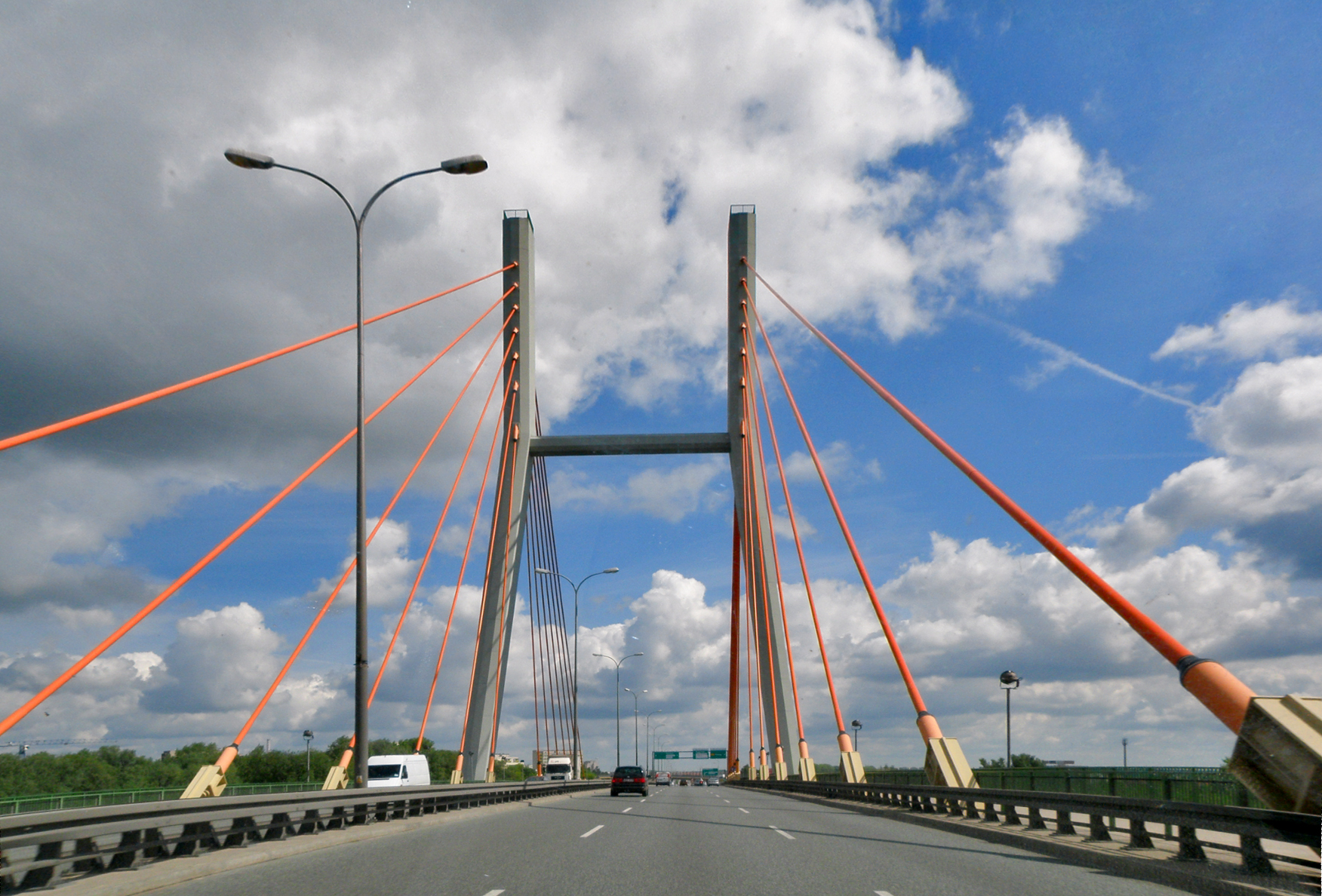 Warszawa, Most Siekierkowski